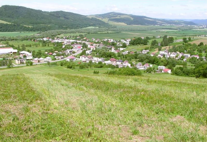 Celkový pohľad na Breznicu